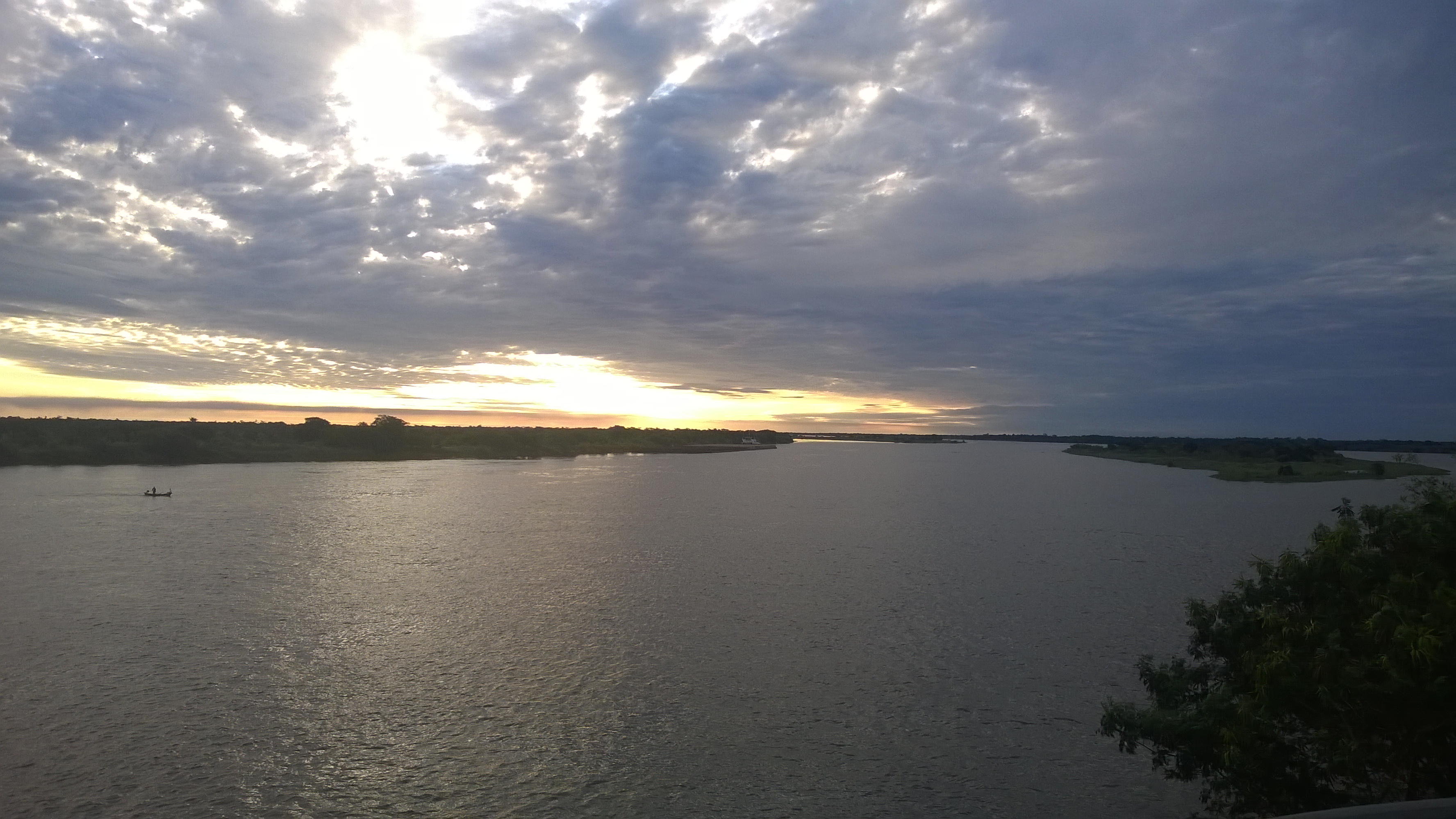 Desde el Mirador 1